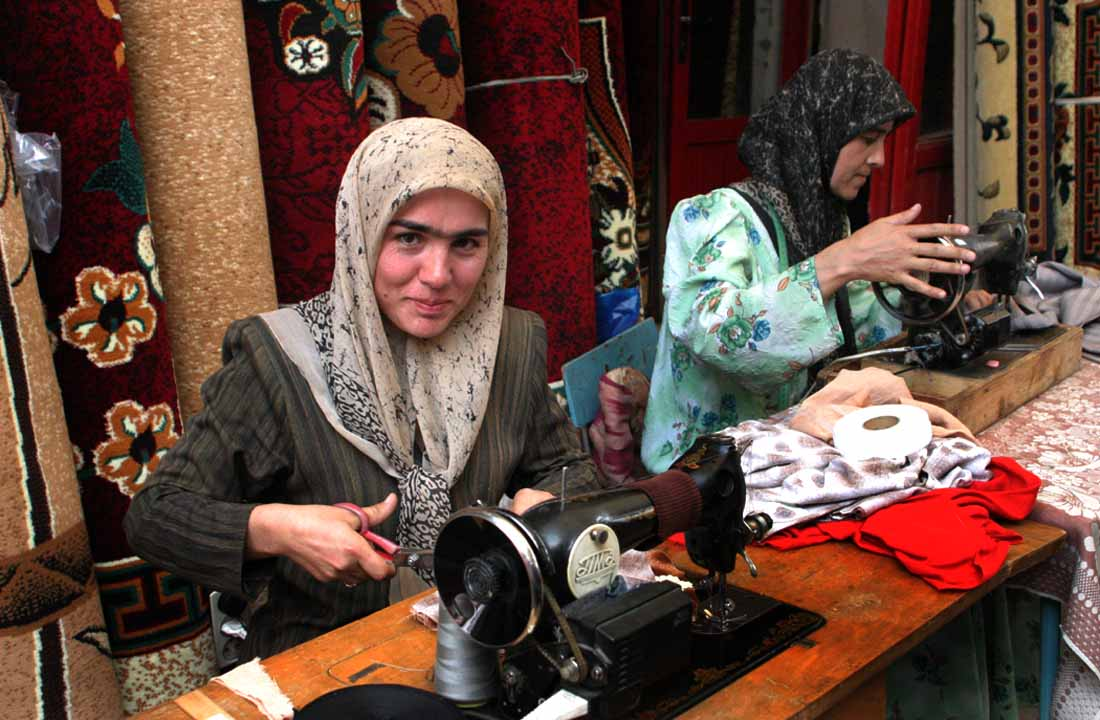 Working women in Tajikistan